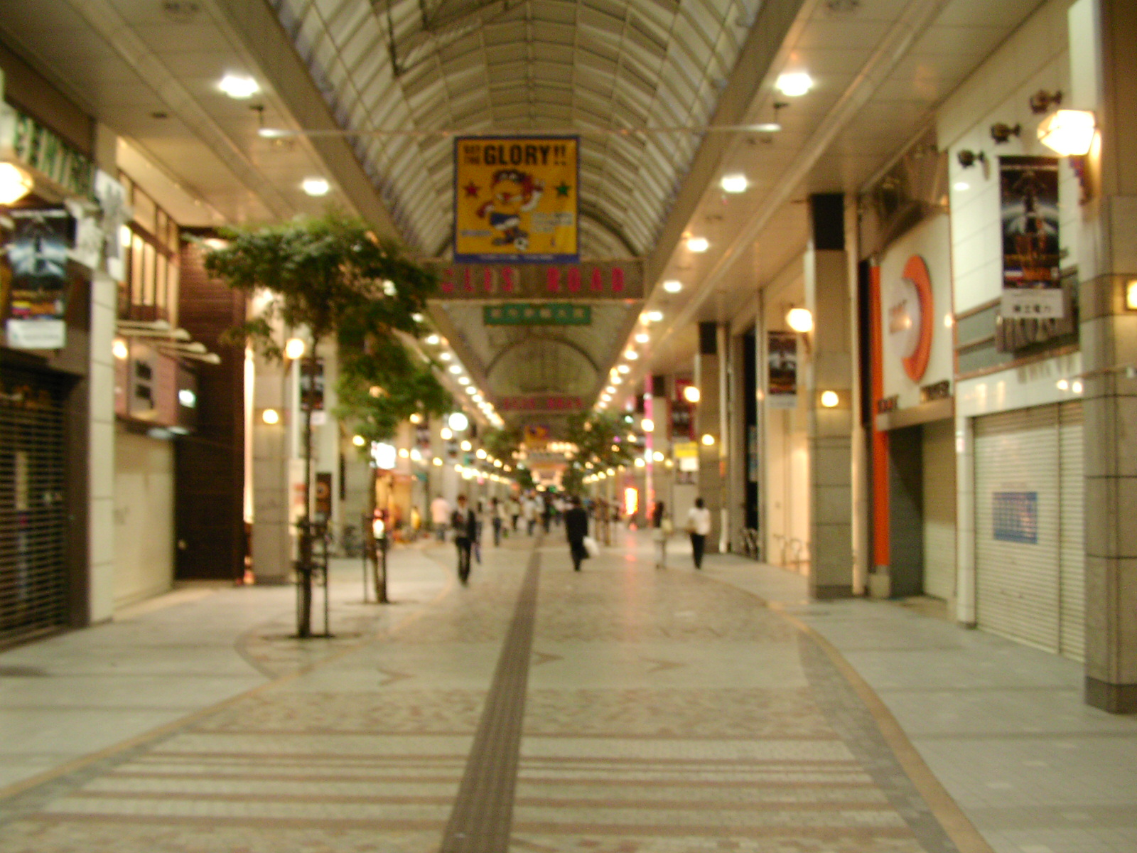 Sendaichuohdori200607 仙台 中央通りの夜